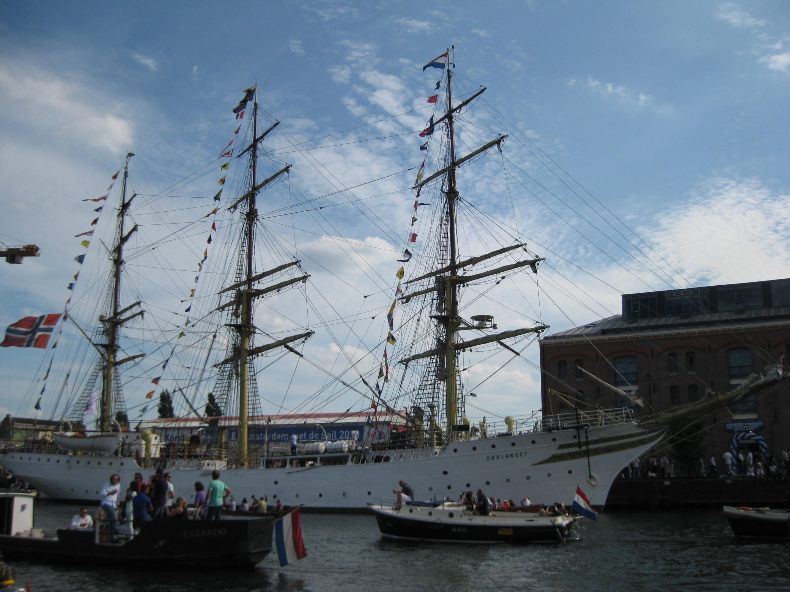 Zeilschip De Sorlandet tijdens Sail Amsterdam 2010